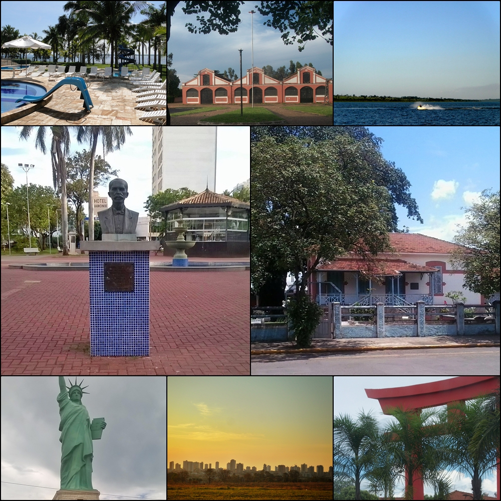 Montagem com elementos da cidade de Araçatuba, São Paulo, Brasil.